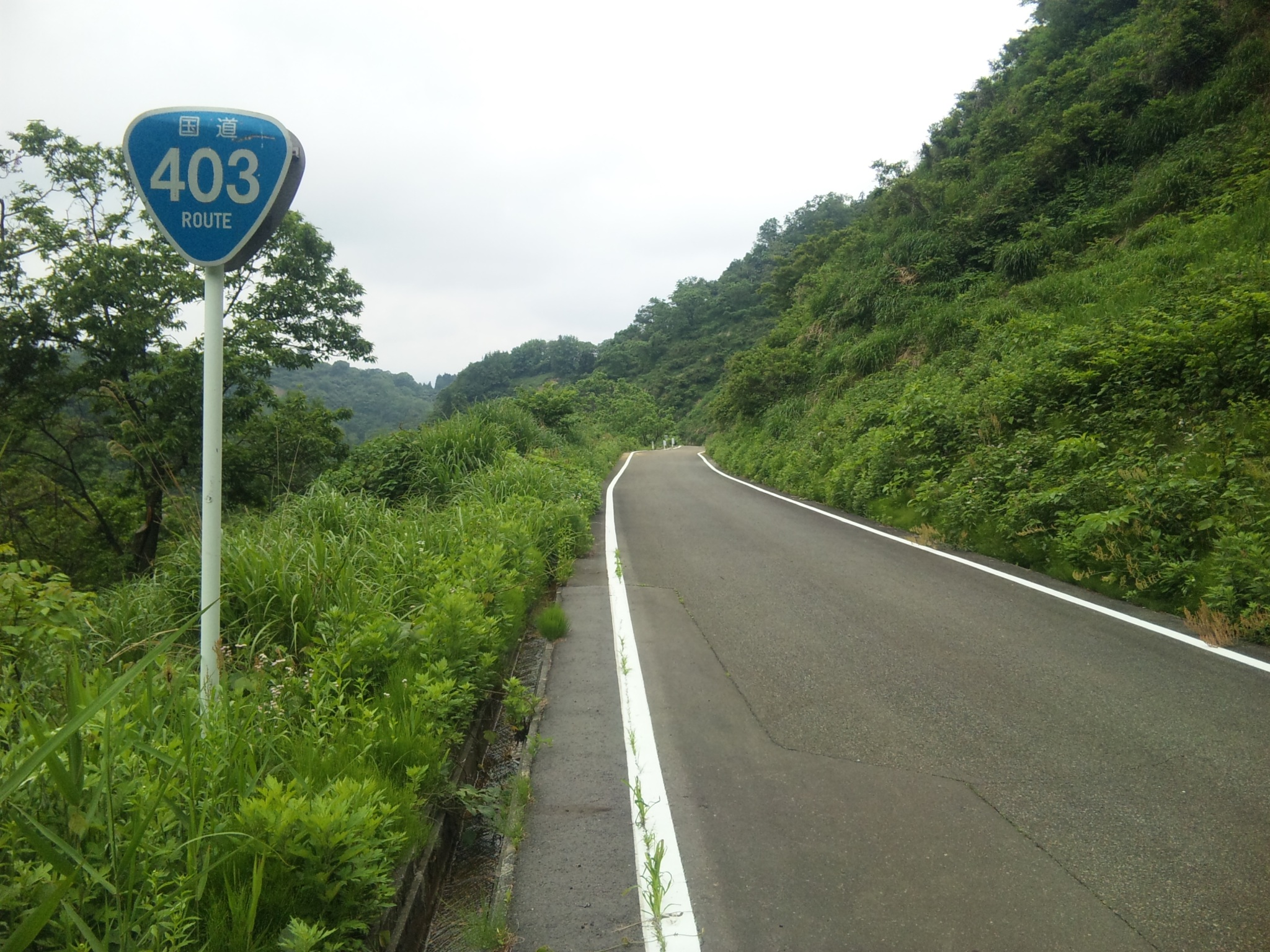 国道403号線小国峠（新潟県長岡市小国町）付近で撮影。